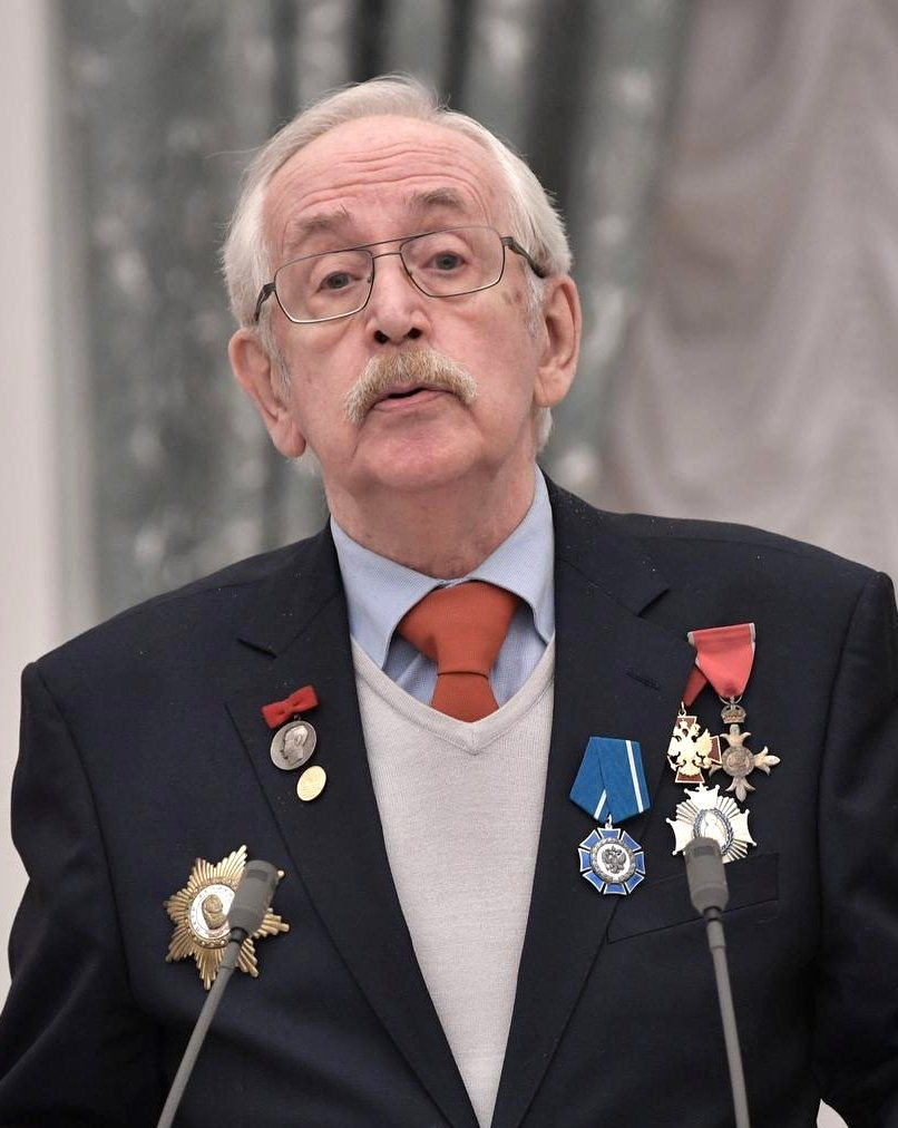 Советский и российский актёр кино Василий Ливанов на церемонии вручения государственных наград в Кремле, 26 января 2017 года.